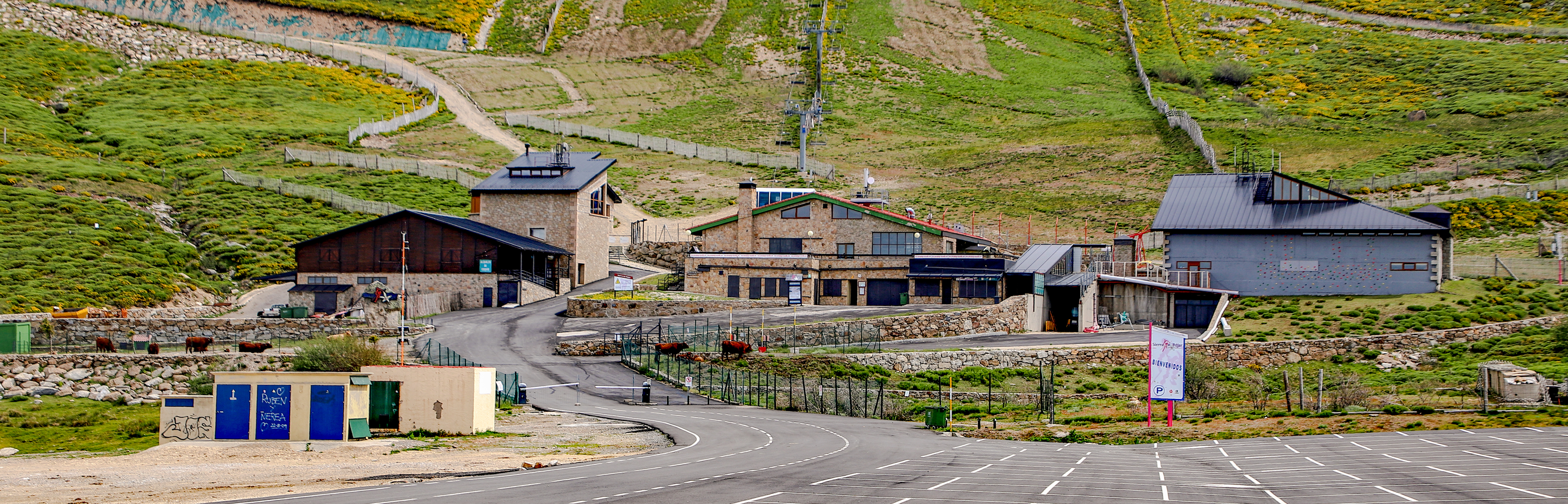 La Hoya es un municipio de la comarca Sierra de Béjar, en la provincia de Salamanca.